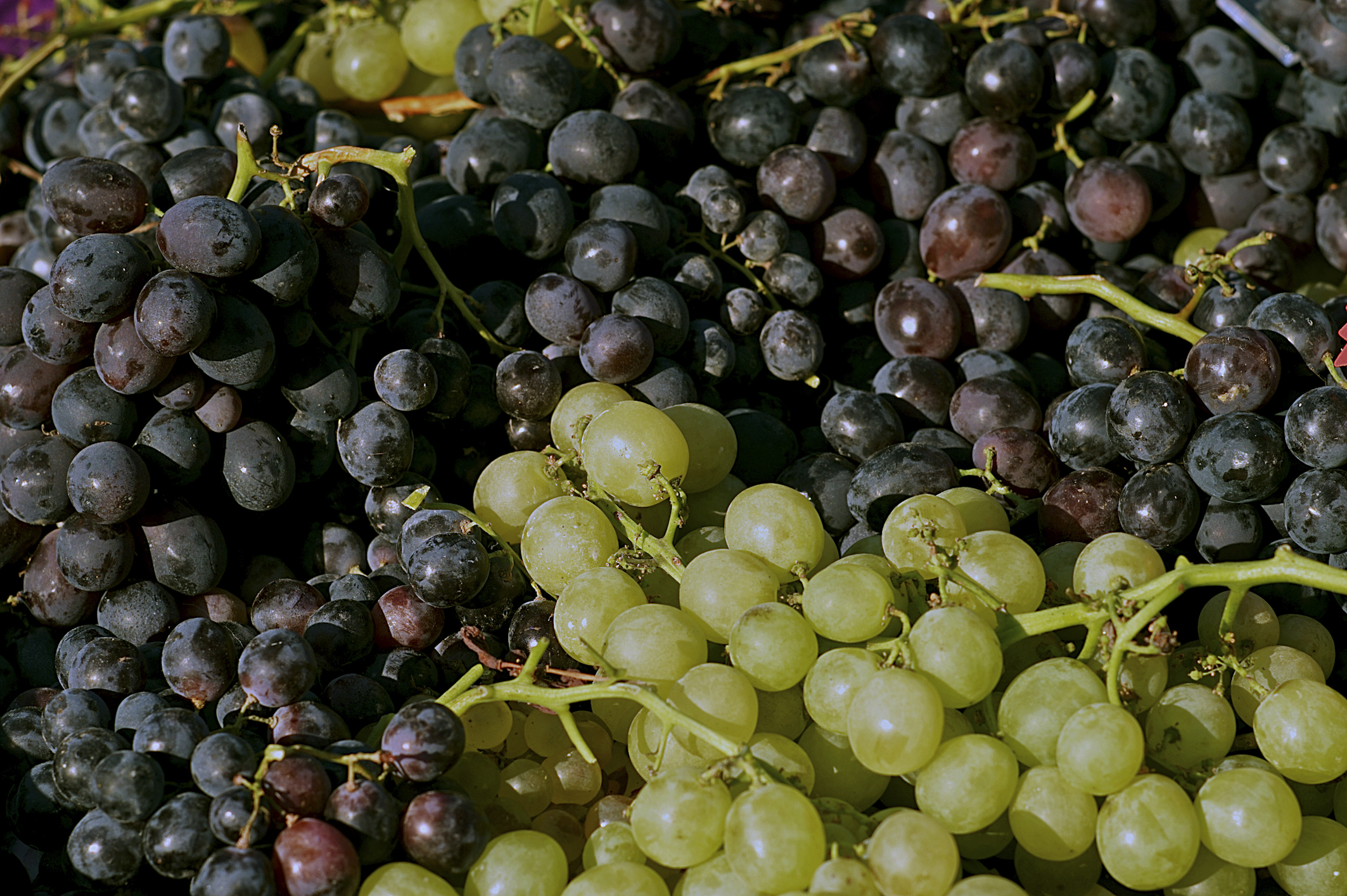 INRA, Jean Weber